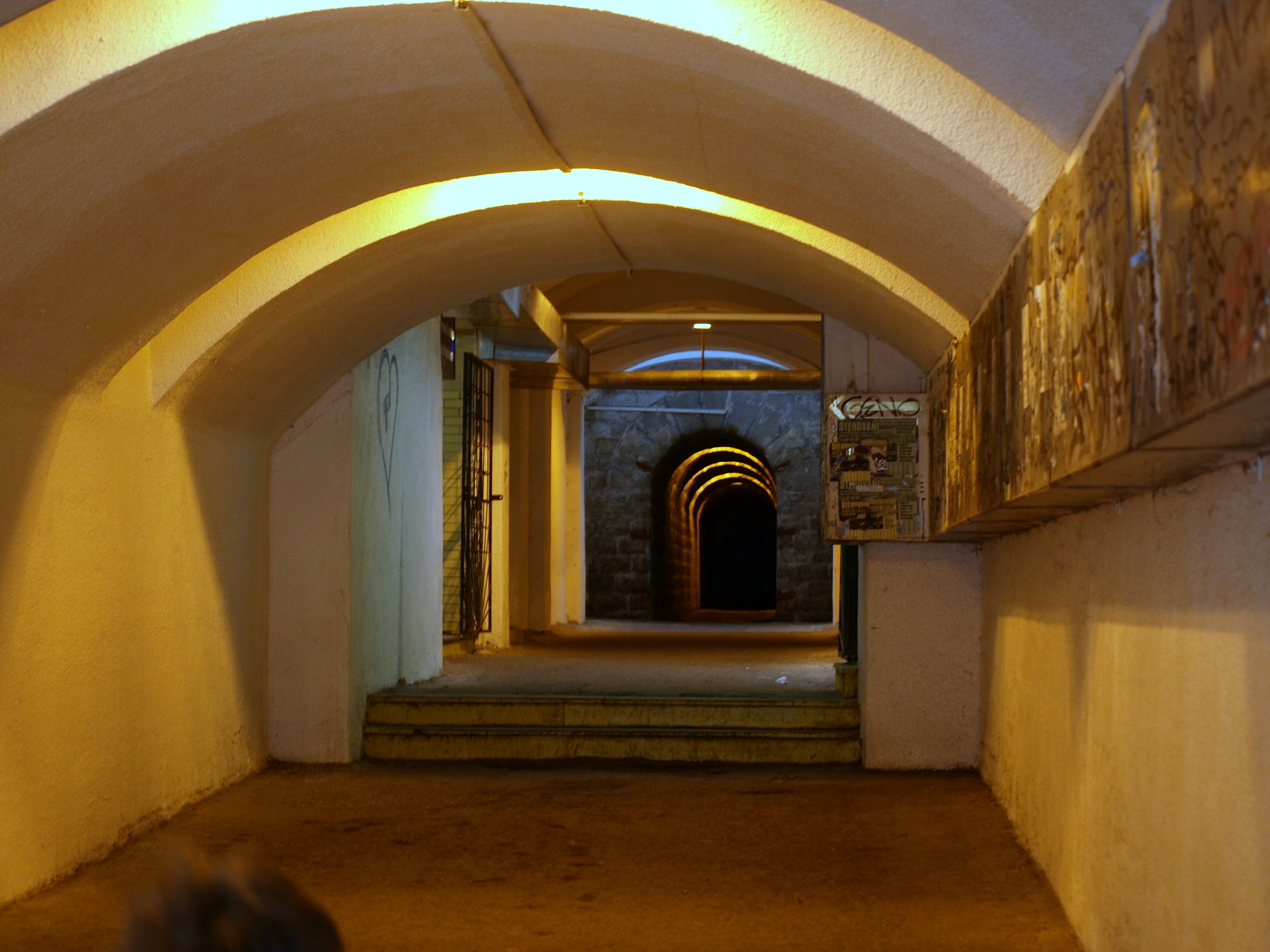 Nádraží Vysočany